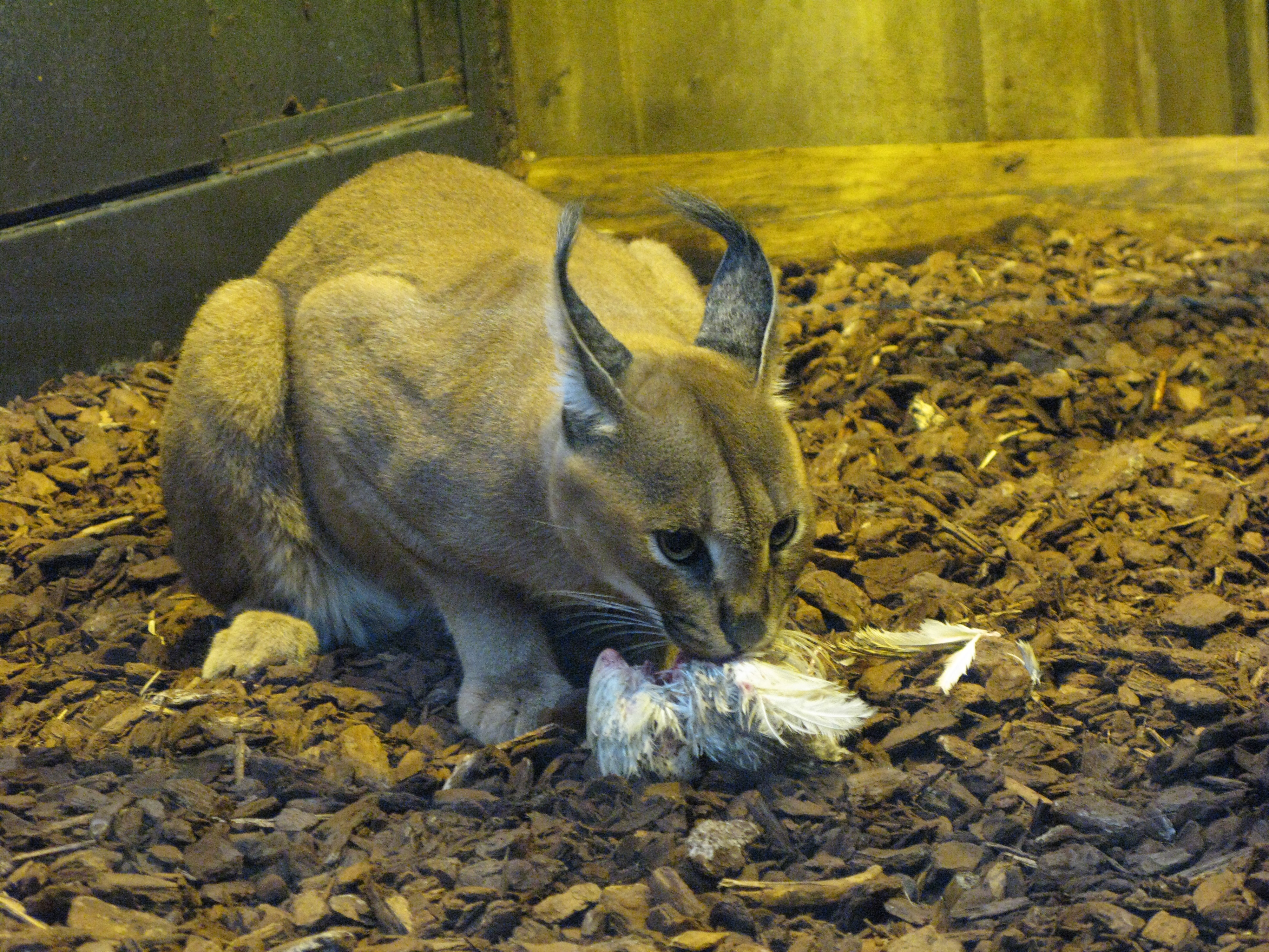 Caracal (caracal caracal) mangeant, ménagerie du Jardin des Plantes de Paris.